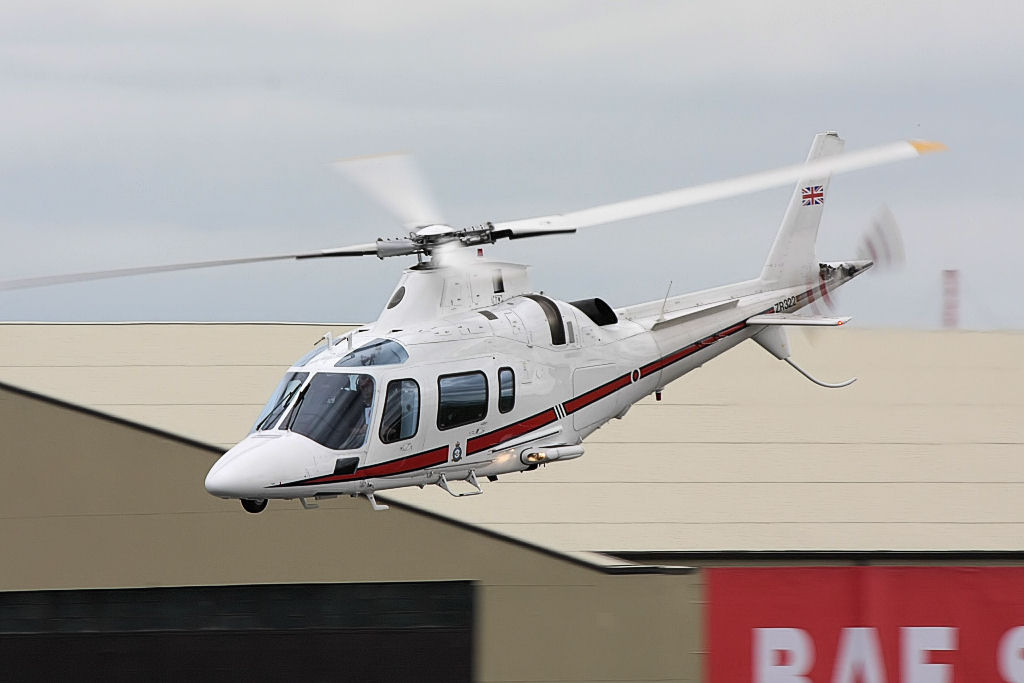 A109 - RIAT 2008